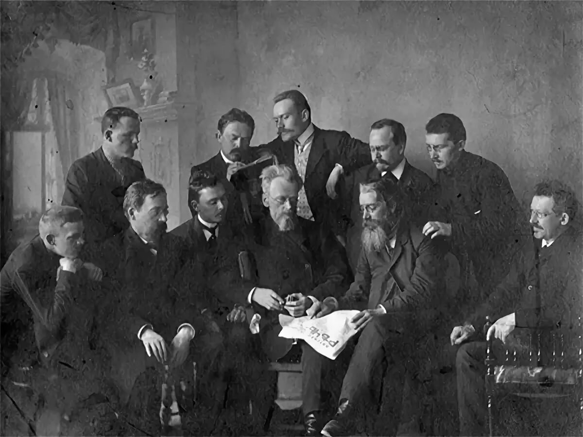 Сотрудники редакции газеты "Вятская речь", в 1909 году, в центре Николай Аполлонович Чарушин. Из фондов Кировской областной научной библиотеки им. А. И. Герцена